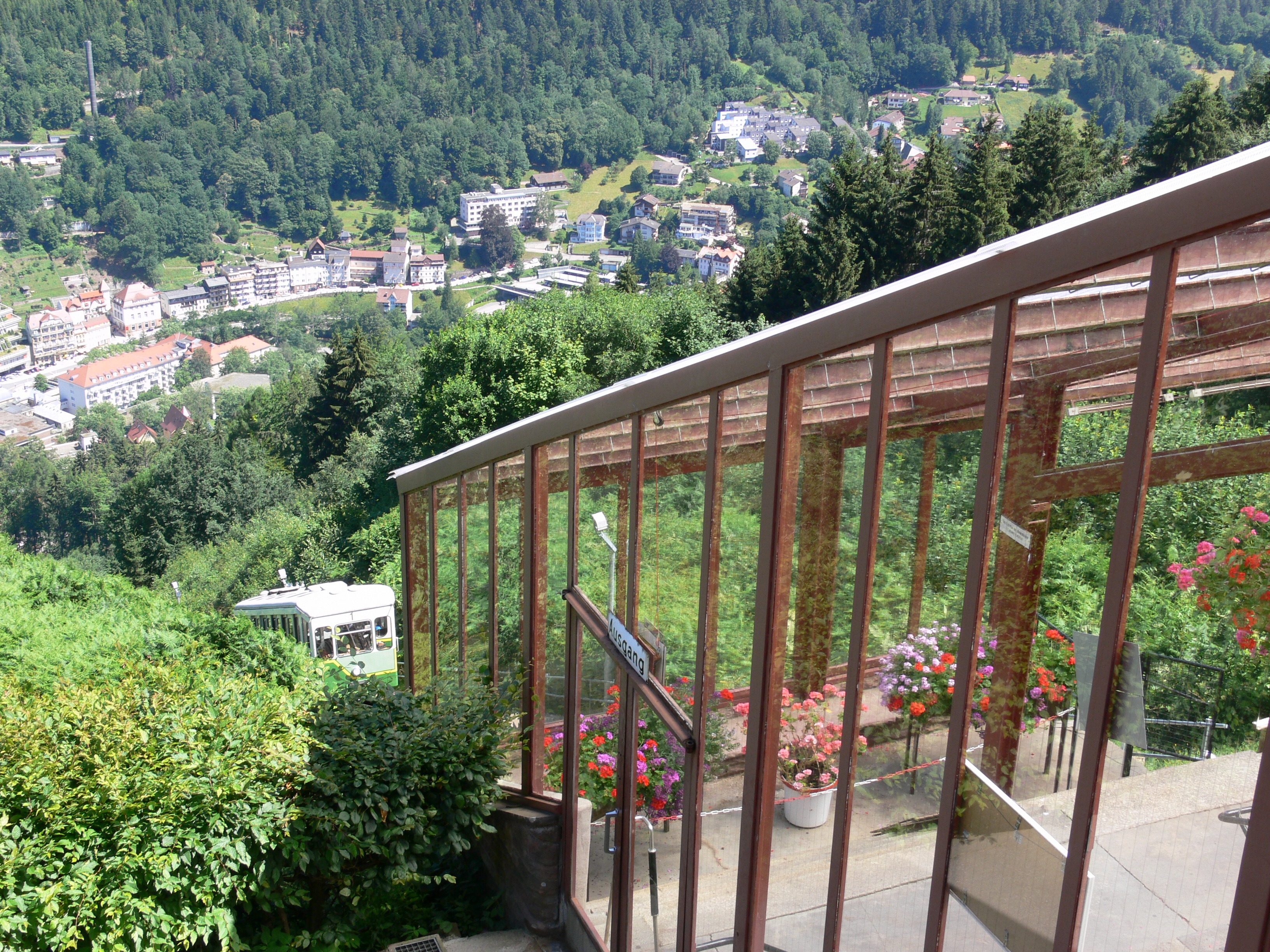 Sommerbergbahn Bad Wildbad